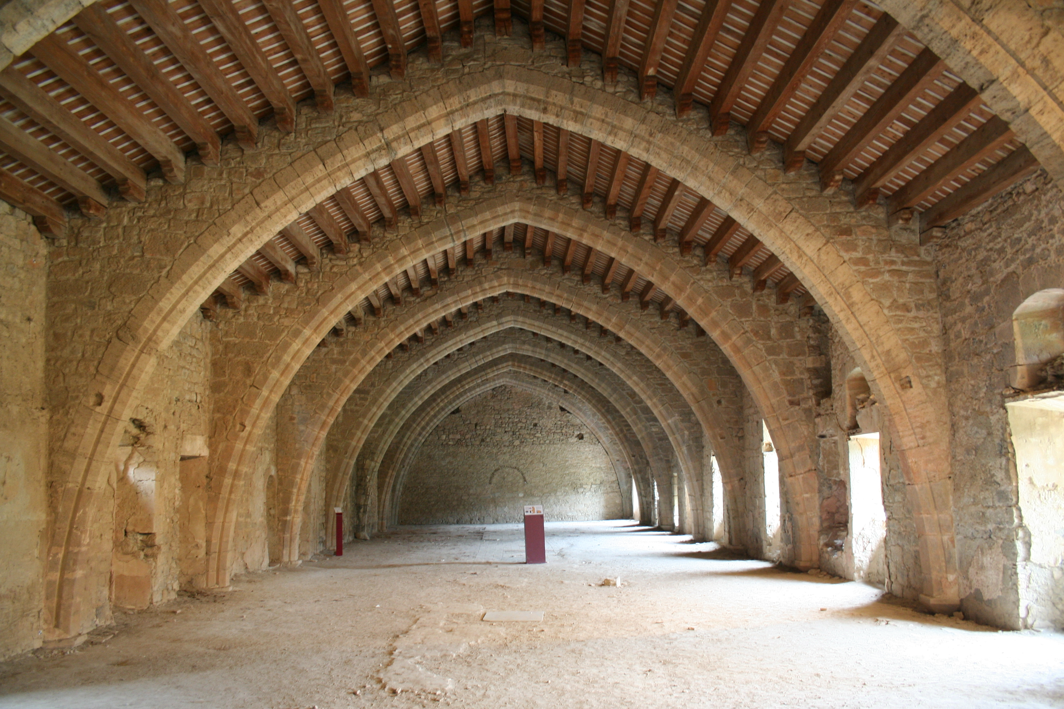 Dortoir de l'ancienne abbaye Sainte-Marie d'Orbieu - Lagrasse - Aude - France .